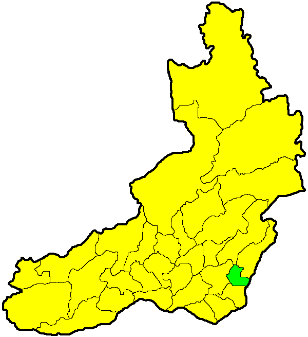 Калганский район на карте Забайкальского края